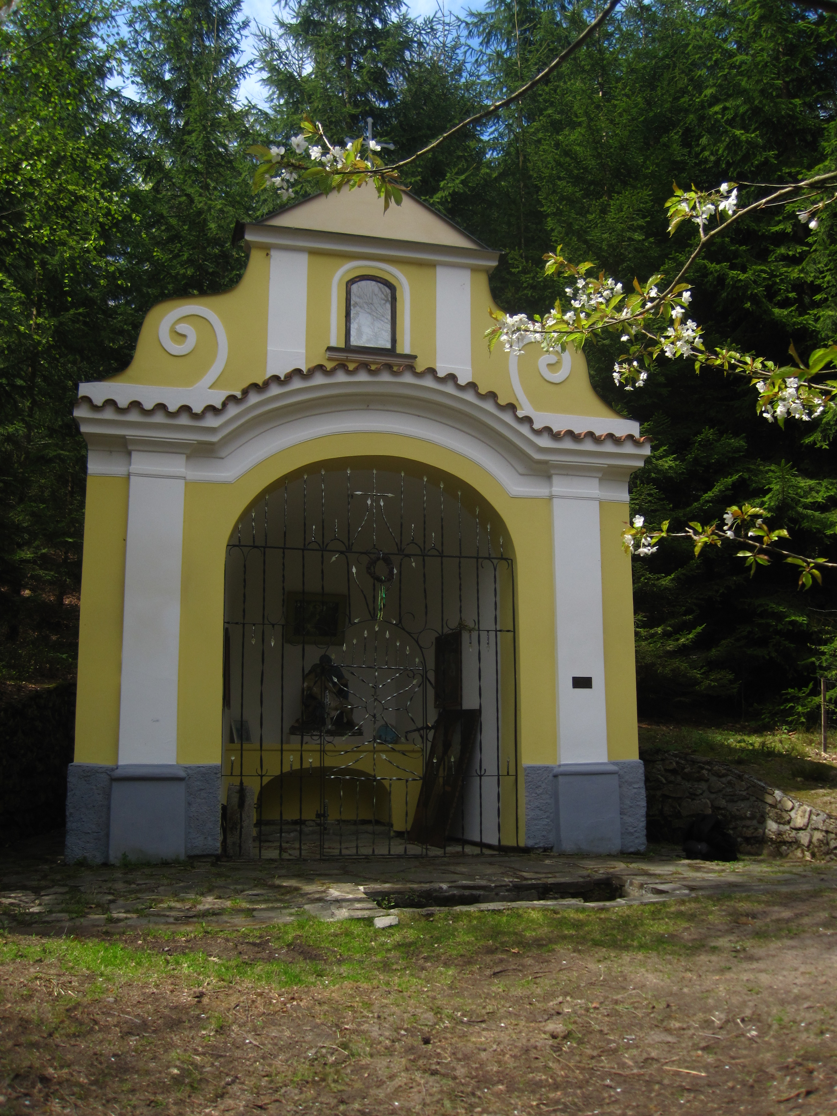 Zaječí pramen - poutní místo pod Kamenskou horou (mezi Kamennou a Střeziměřicemi)